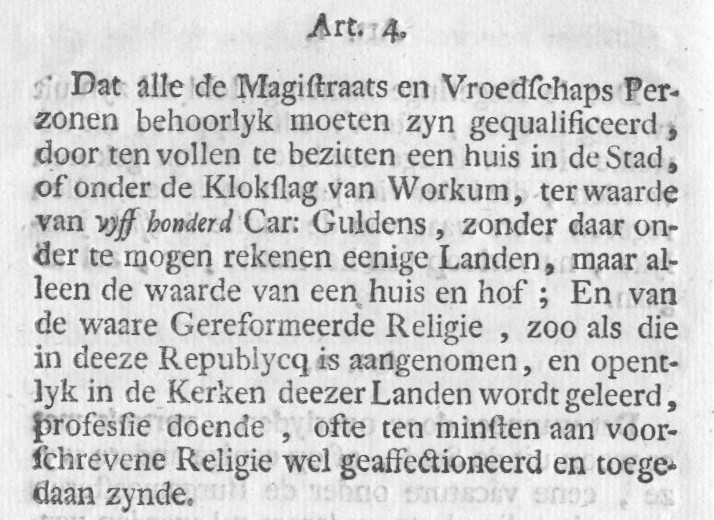 Reglement van Regeringe voor de stad Workum